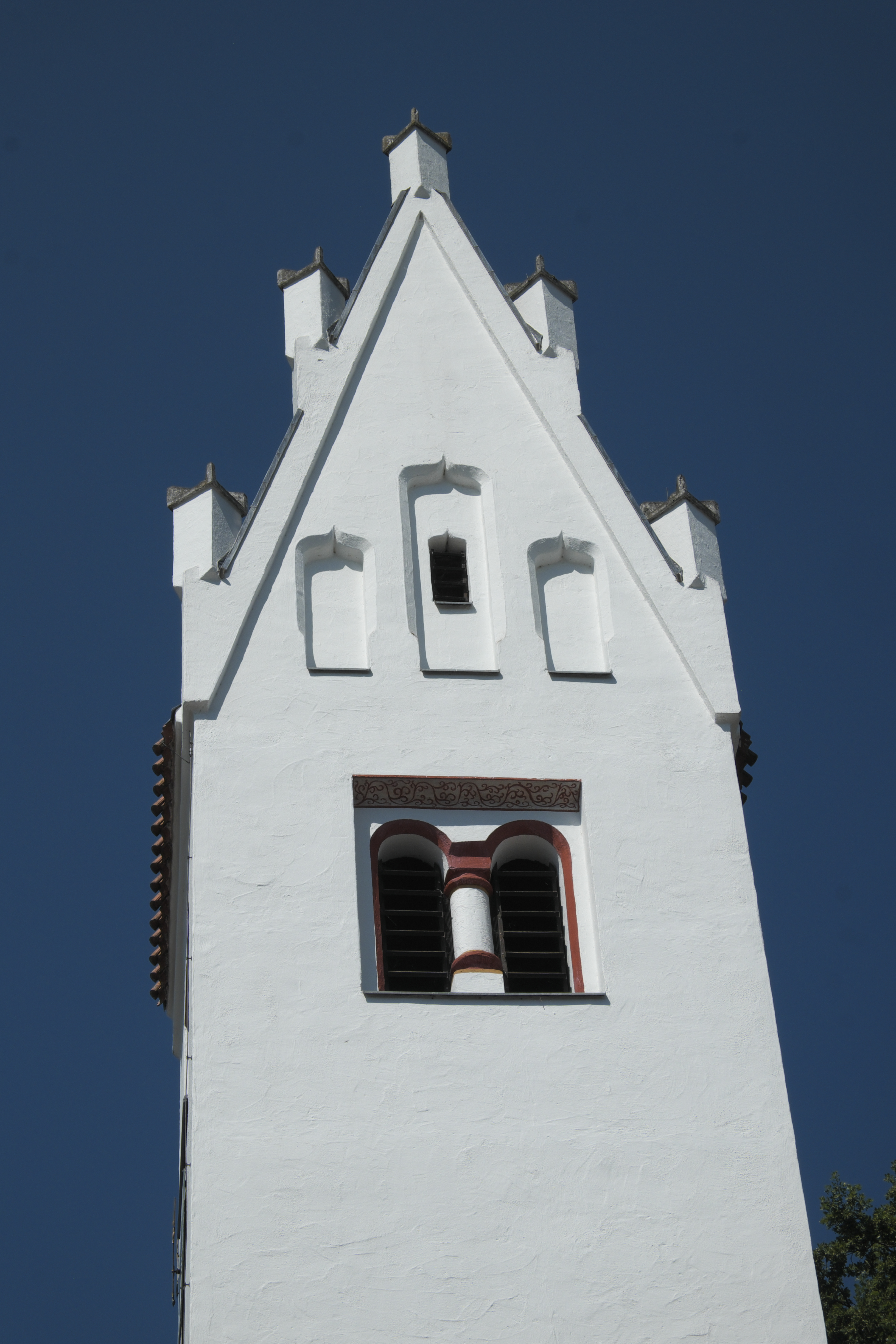 Katholische Pfarrkirche St. Michael in Wenigmünchen (Egenhofen) im oberbayerischen Landkreis Fürstenfeldbruck (Bayern/Deutschland), Turm